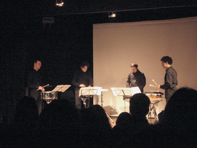 Concerto do Grupo de Música Contemporânea de Porto Alegre. Diego Silveira é o segundo da E para a D.